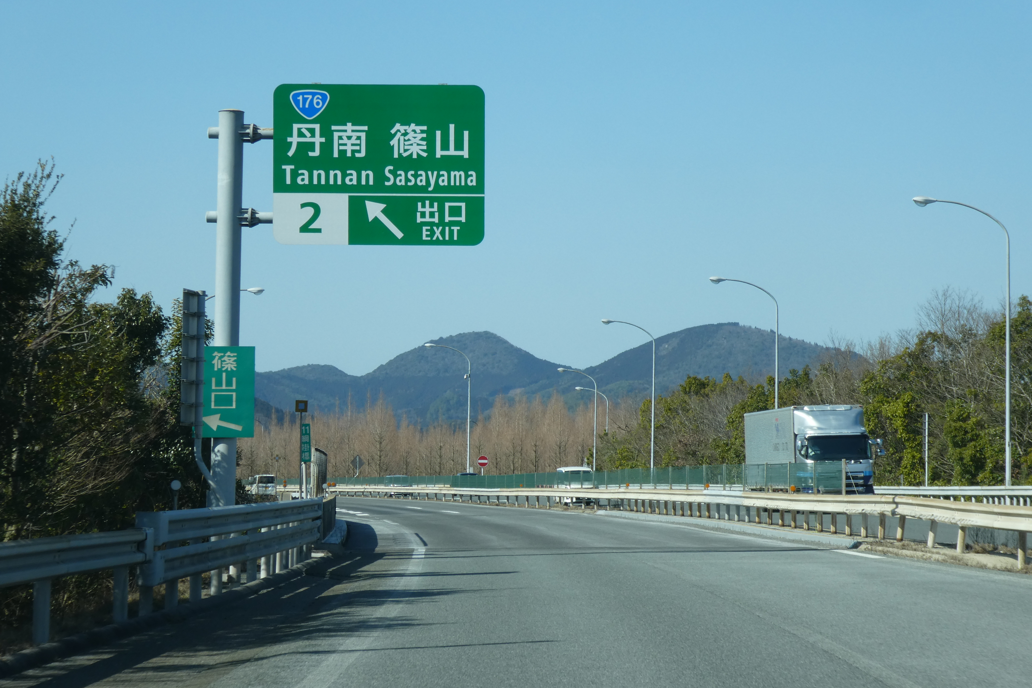 丹南篠山口インターチェンジ